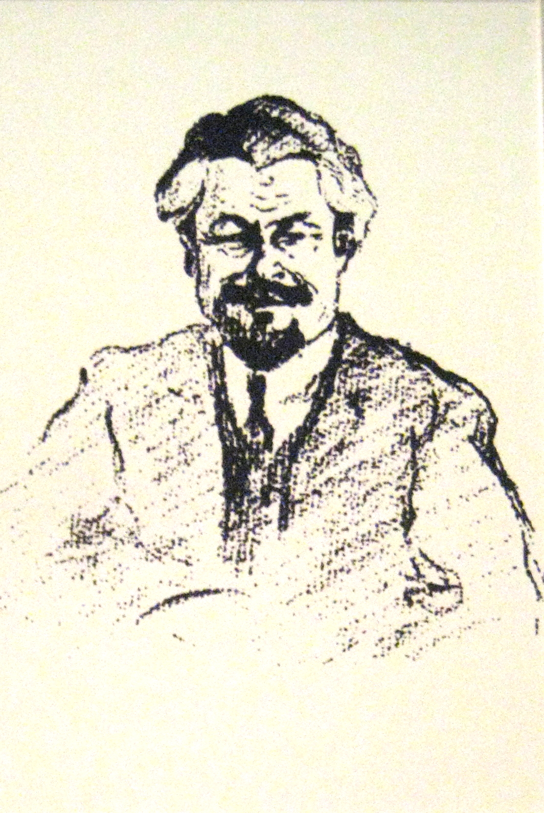 Ю.К. Арцыбушев. Портреты политических деятелей. Москва, 14 августа 1917. ГИМ. Зарисовки с натуры, выполненные во время Государственного совещания в Москве, были опубликованы в издательстве Д.Я. Маковского